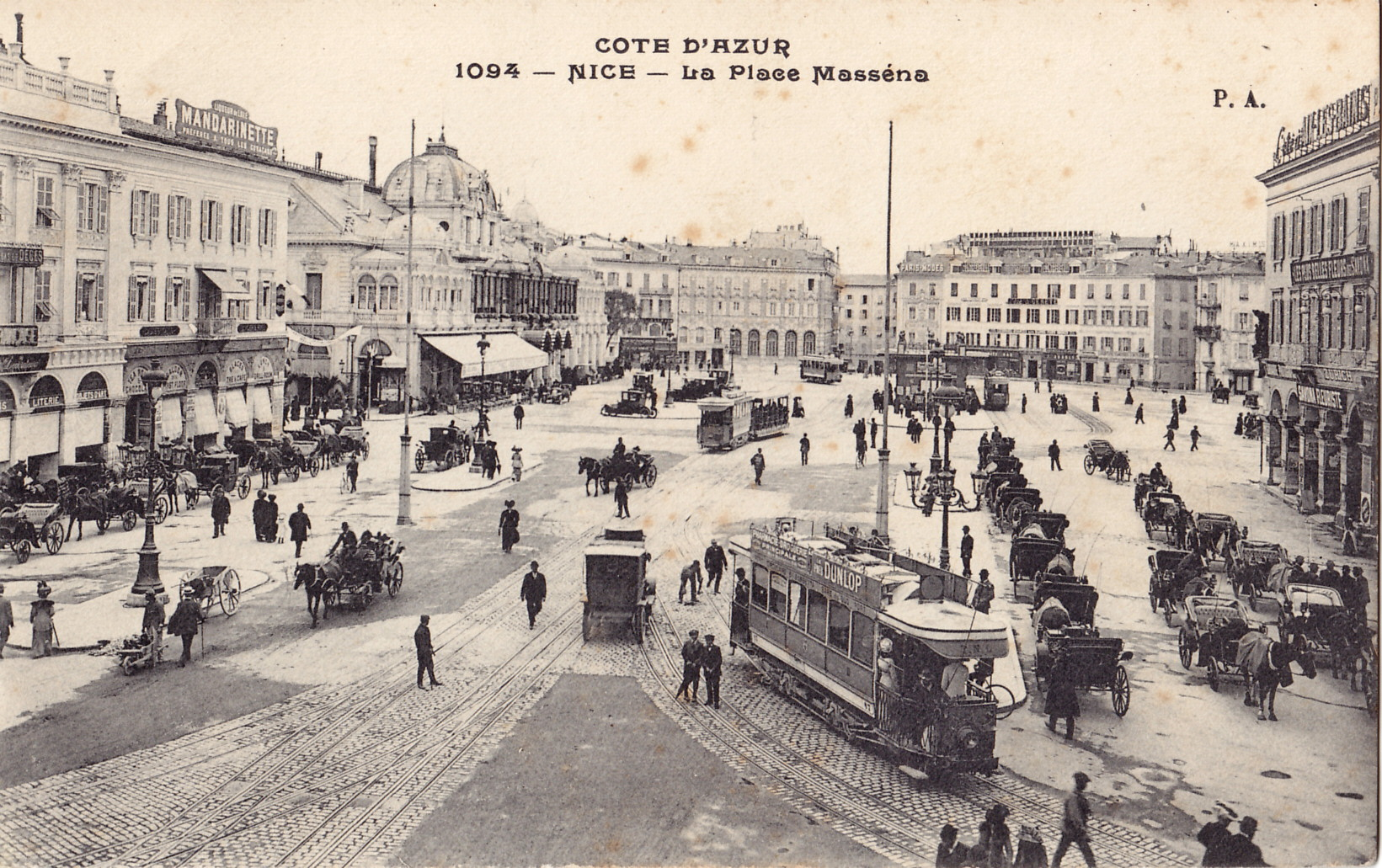 Carte postale ancienne éditée par PA, n°1094 :NICE - La Place Masséna